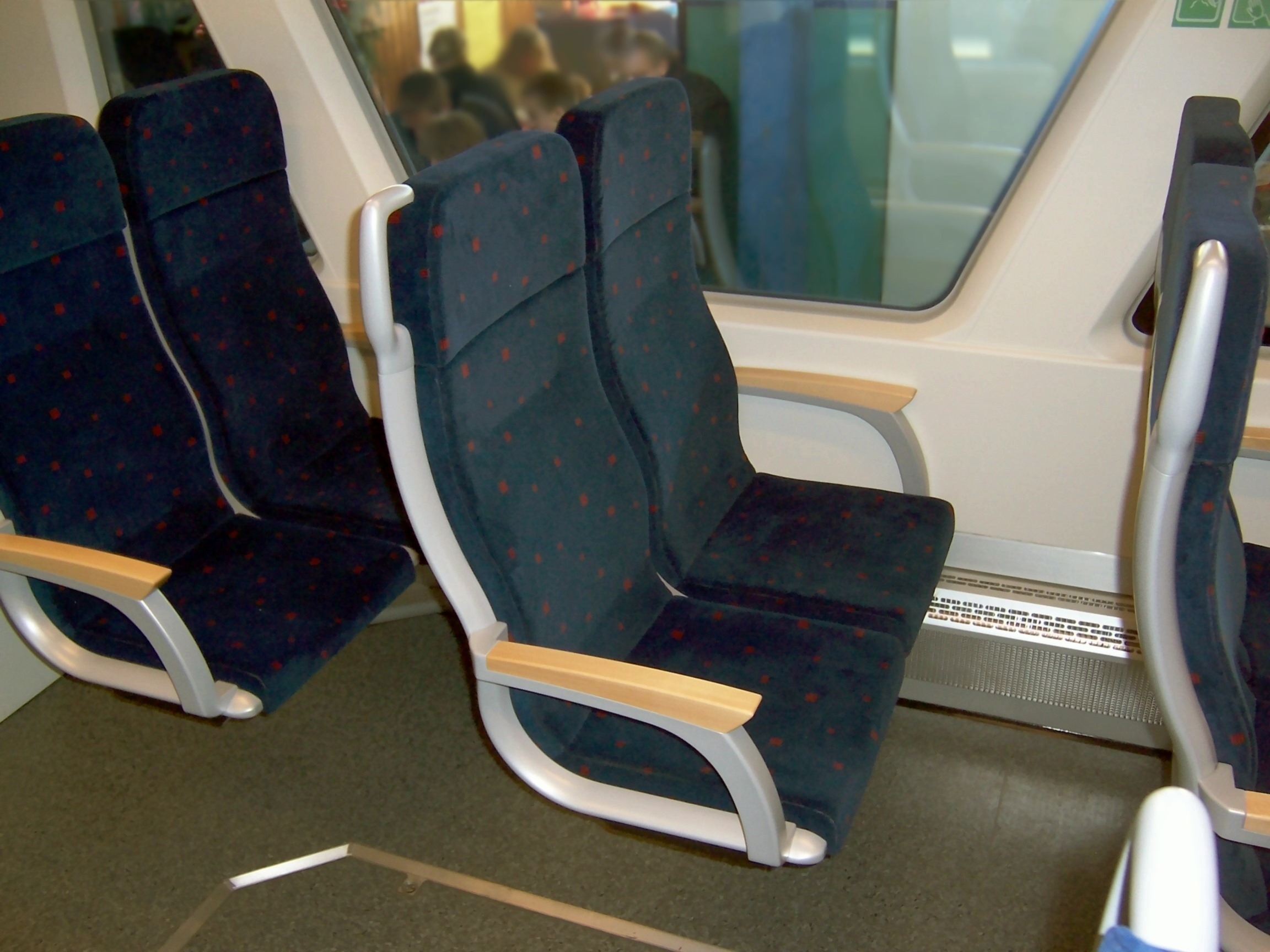 Bildbeschreibung/Description: Sitze/Seats 2. Klasse ITINO D2 Bombardier Transportation, Odenwaldbahn Quelle/Source: selbst fotografiert/self taken Photo Fotograf/Photographer: Markus Flath Datum/Date: 11.12.2005 Deutschland/Germany